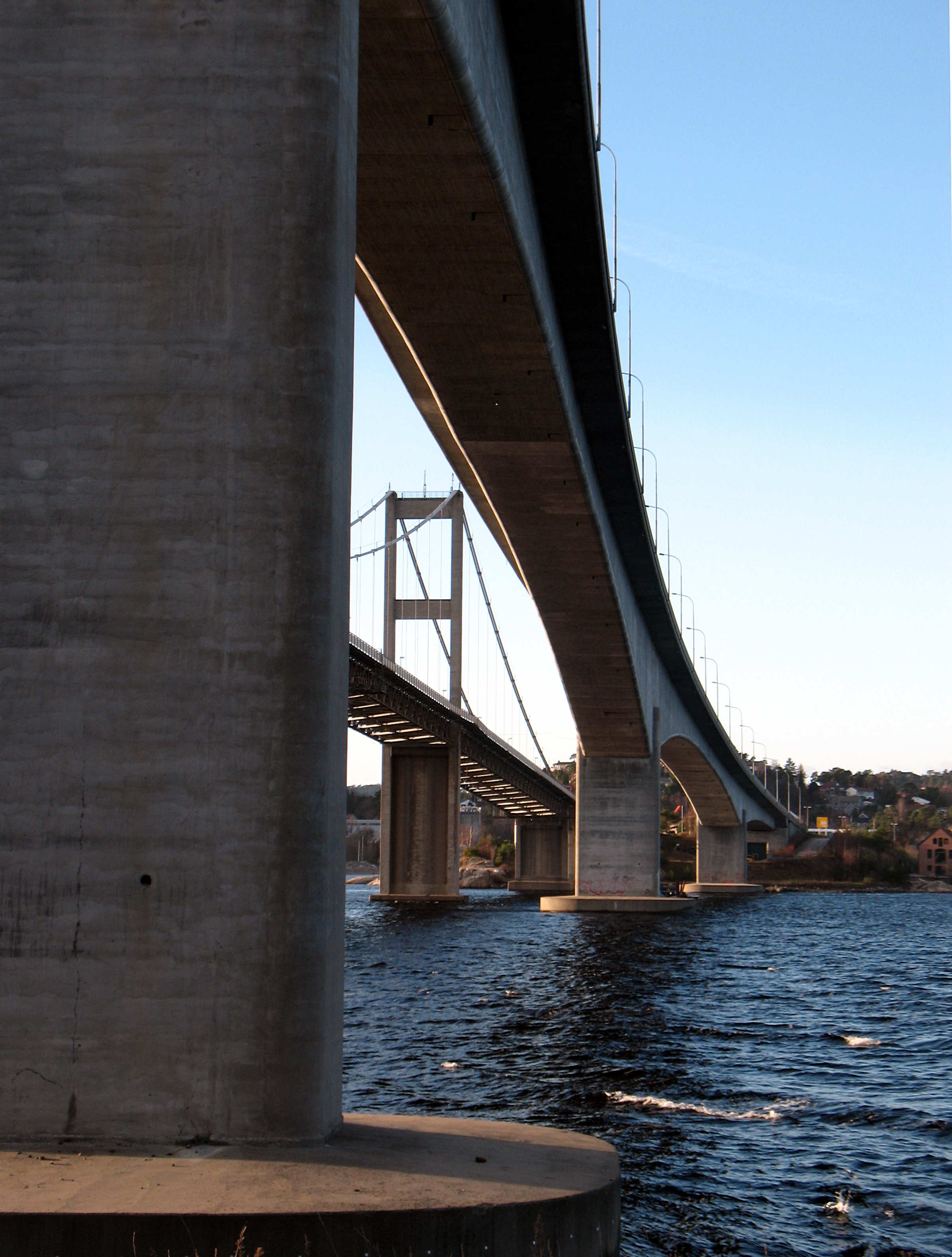 Den gamle broen sett gjennom den nye Varoddbroen (E18) sett fra Torsvikveien mot Varodden over Topdalsfjorden.